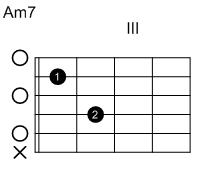 Eigenanfertigung